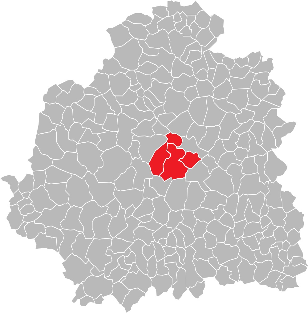 Carte des communes de l'Indre (36) : Le canton de Châteauroux-Ouest, de 1973 à 2015.